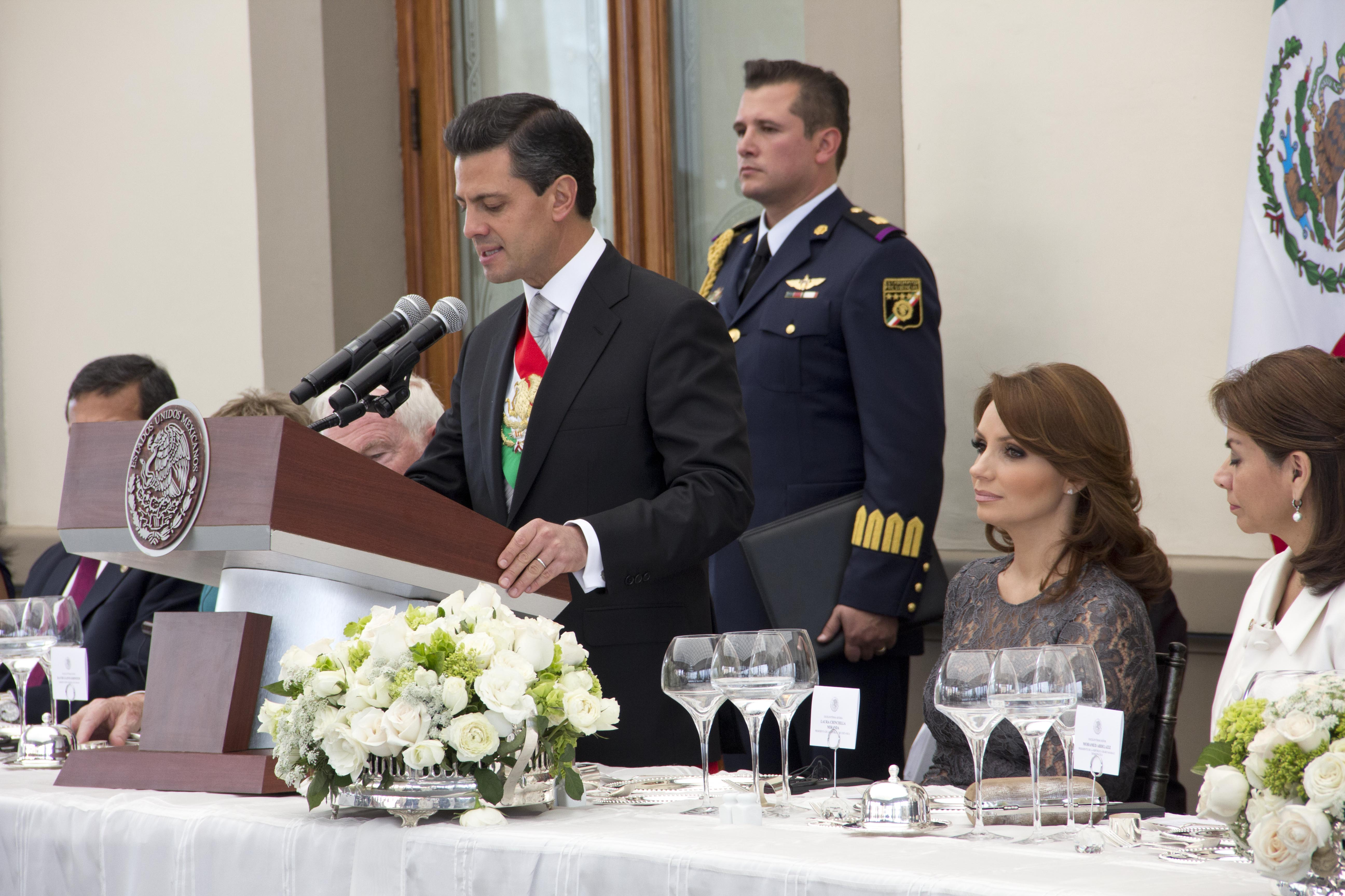 Comida con Jefes de Estado. México, D.F. 1 de diciembre de 2012